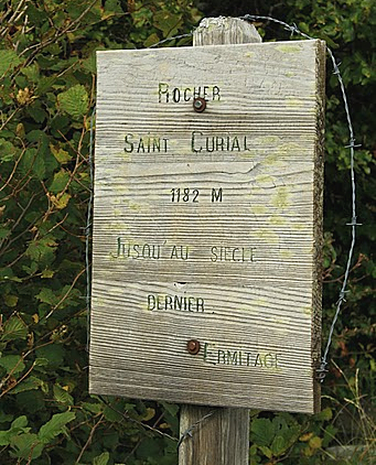 Pancarte Ermitage de Saint-Curiat